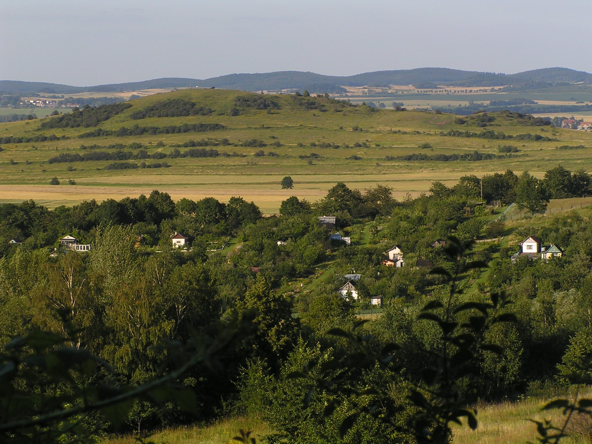 Łysa Góra z Góry Parkowej